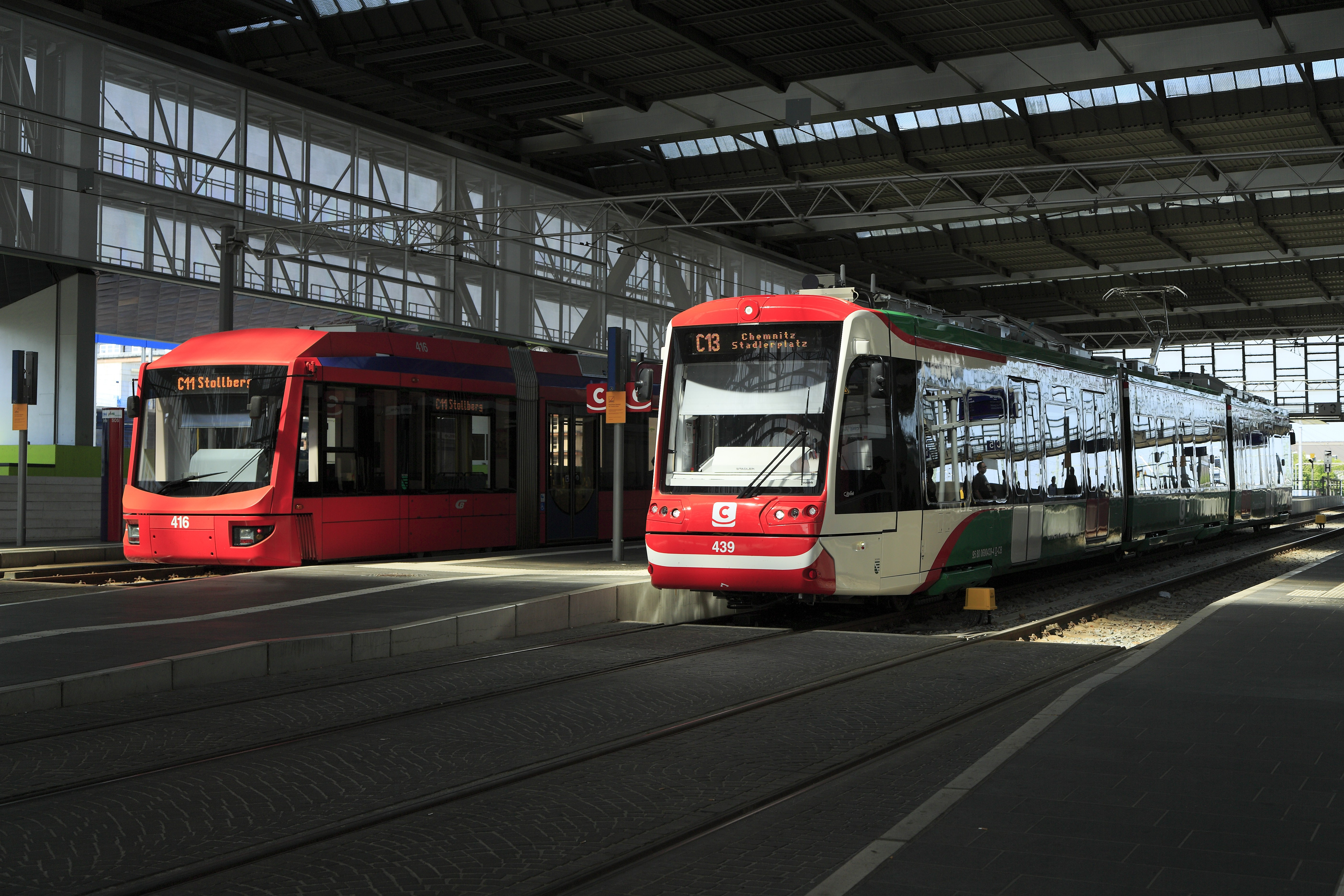 Zwei Züge der Chemnitzbahn auf den Bahnsteiggleisen, der linke der Linie C11 von und nach Stollberg (Erzbeb) verkehrt im Uhrzeigersinn durch die vollständig zum Straßenbahnnetz gehörende Wendeschleife Chemnitz Hbf, der rechte (Gleis 32, Bahnsteig 3) verkehrt auf der Linie C13, kommt aus dem Fernbahnnetz von Burgstädt und fährt weiter nach Chemnitz Stadlerplatz.